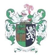 Brasão da Família Silveira dos Açores - WILHELM VAN DER HAGEN